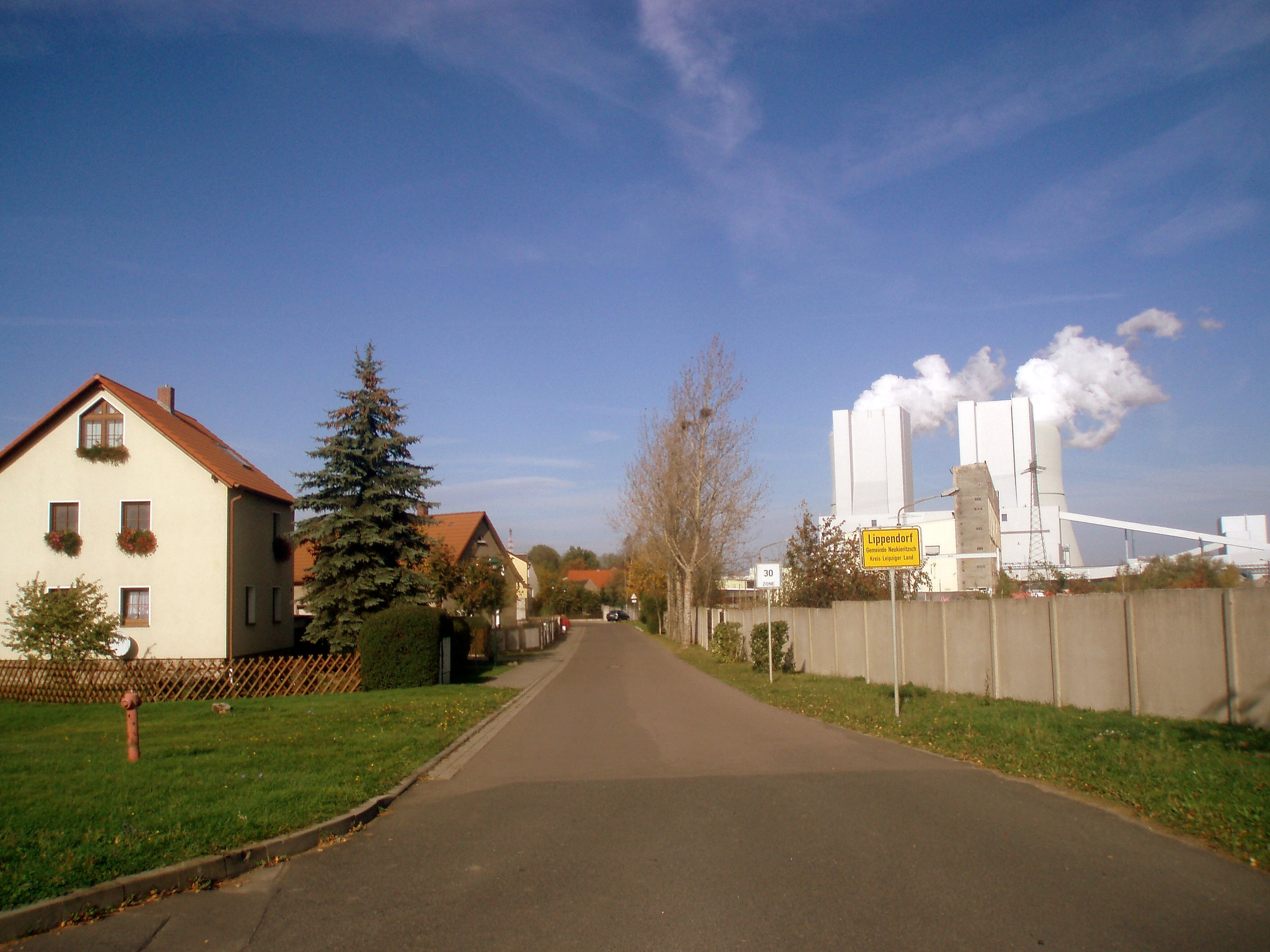 Ortseingang Lippendorf mit Braunkohlenkraftwerk